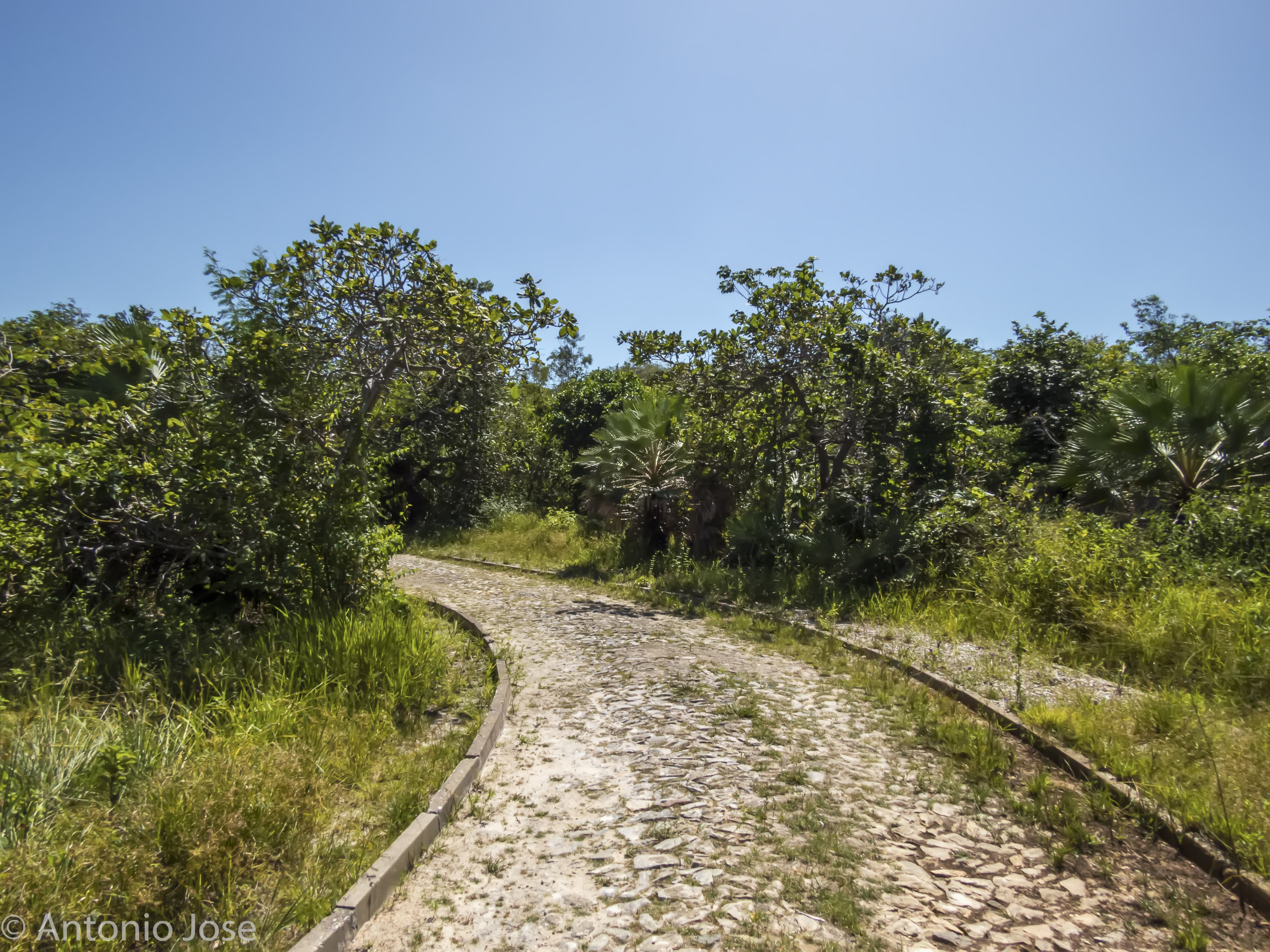 Parque Botânico de Caucaia no Ceará